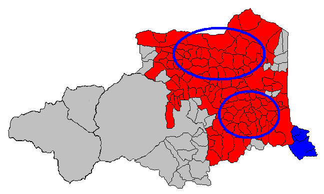 Denominacions d'origen dels vins secs del Rosselló:En blau: AOC CotlliureEn vermell: AOC Costers del RossellóSuperposats: AOC Costers del Rosselló Vilatges, al nord, i AOC Costers del Rosselló els Aspres, al sud